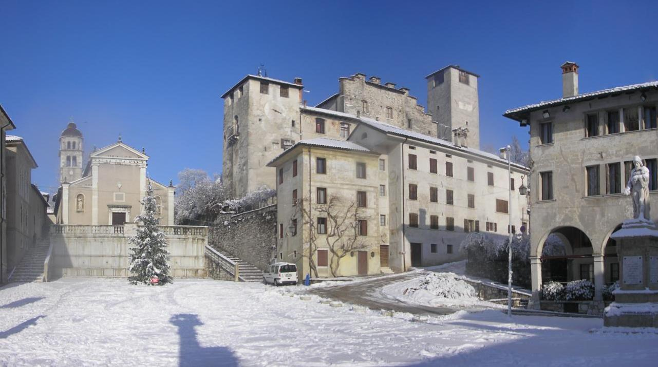 Piazza Maggiore, Feltre, dopo l'ultima nevicata di Natale. Foto di Riccardo Sartor